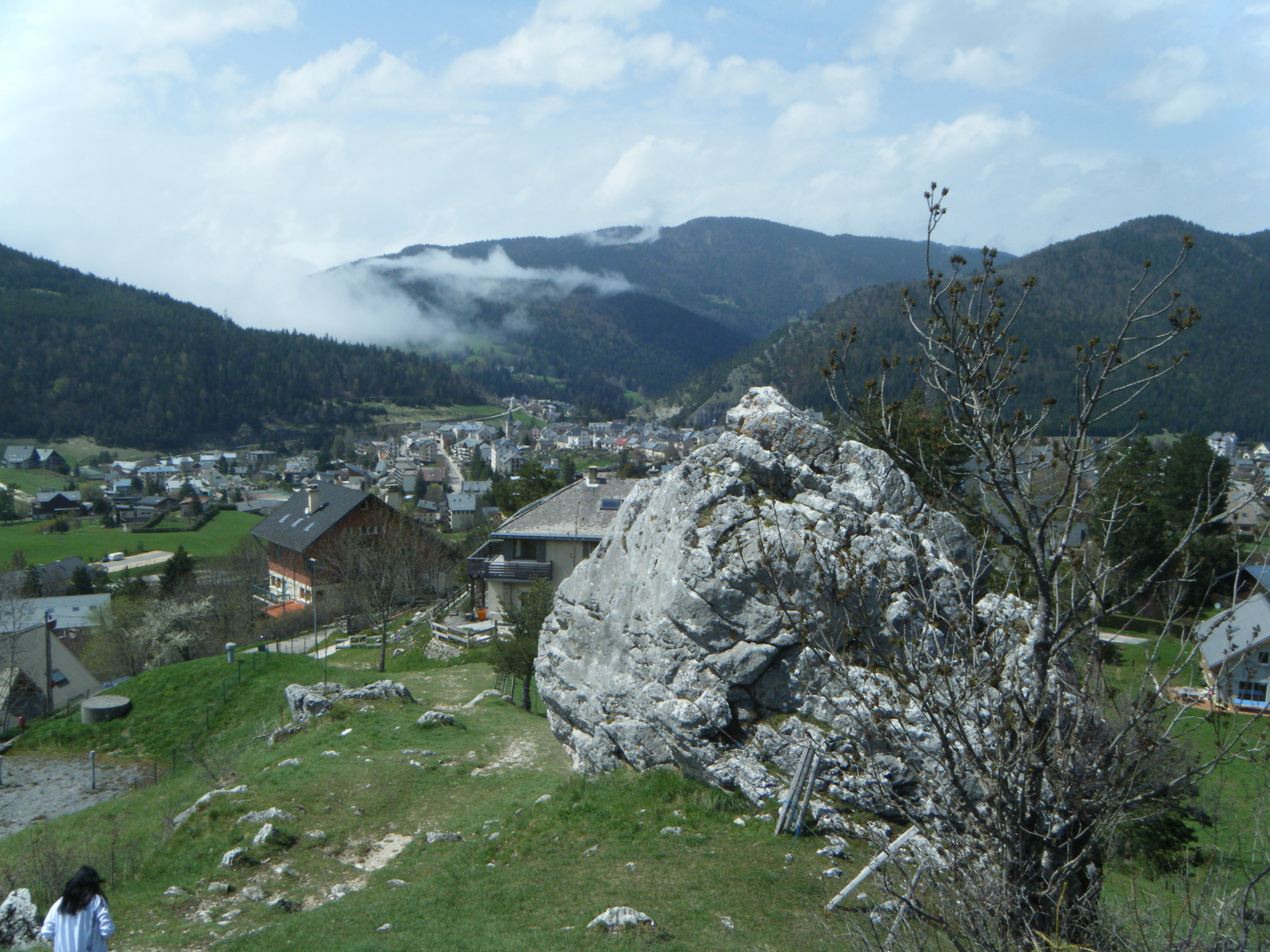 le rocher de la Fauge à Villard le 1er mai 2013